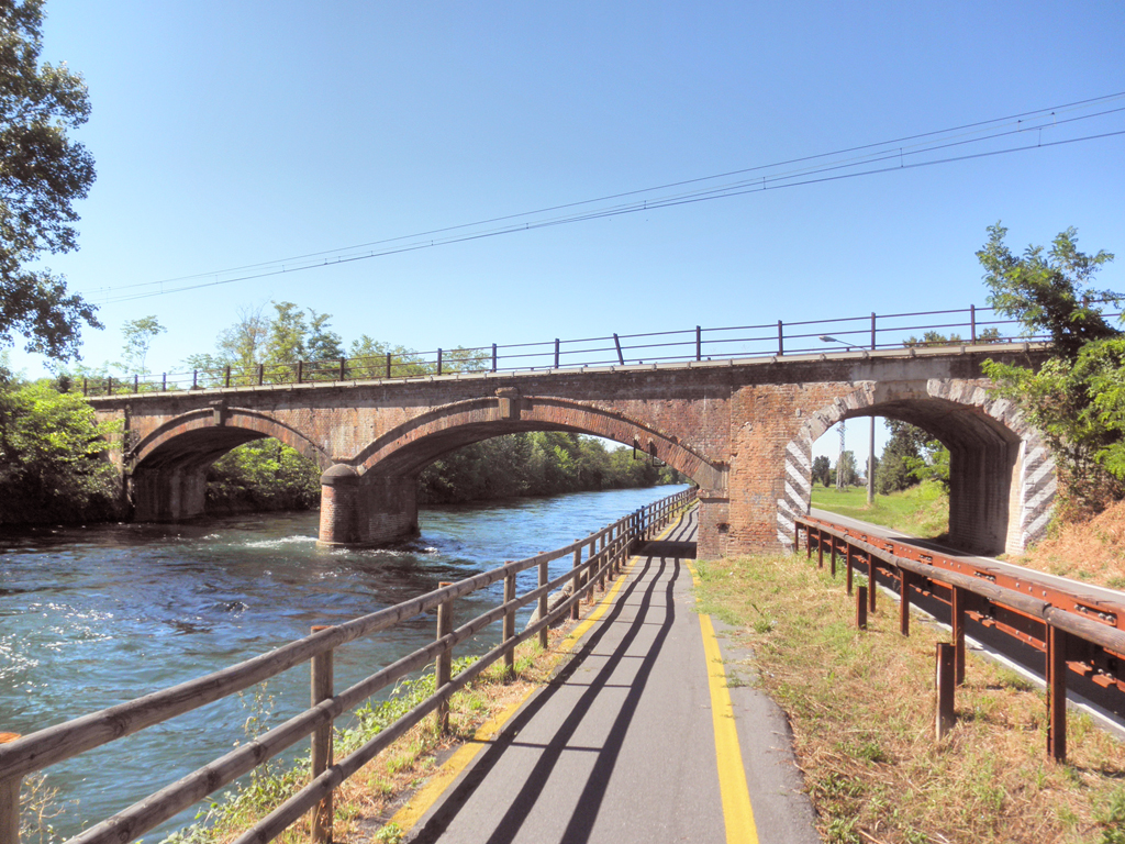 Ponte della ferrovia Mortara-Milano sopra il Naviglio Grande, presso Abbiategrasso.